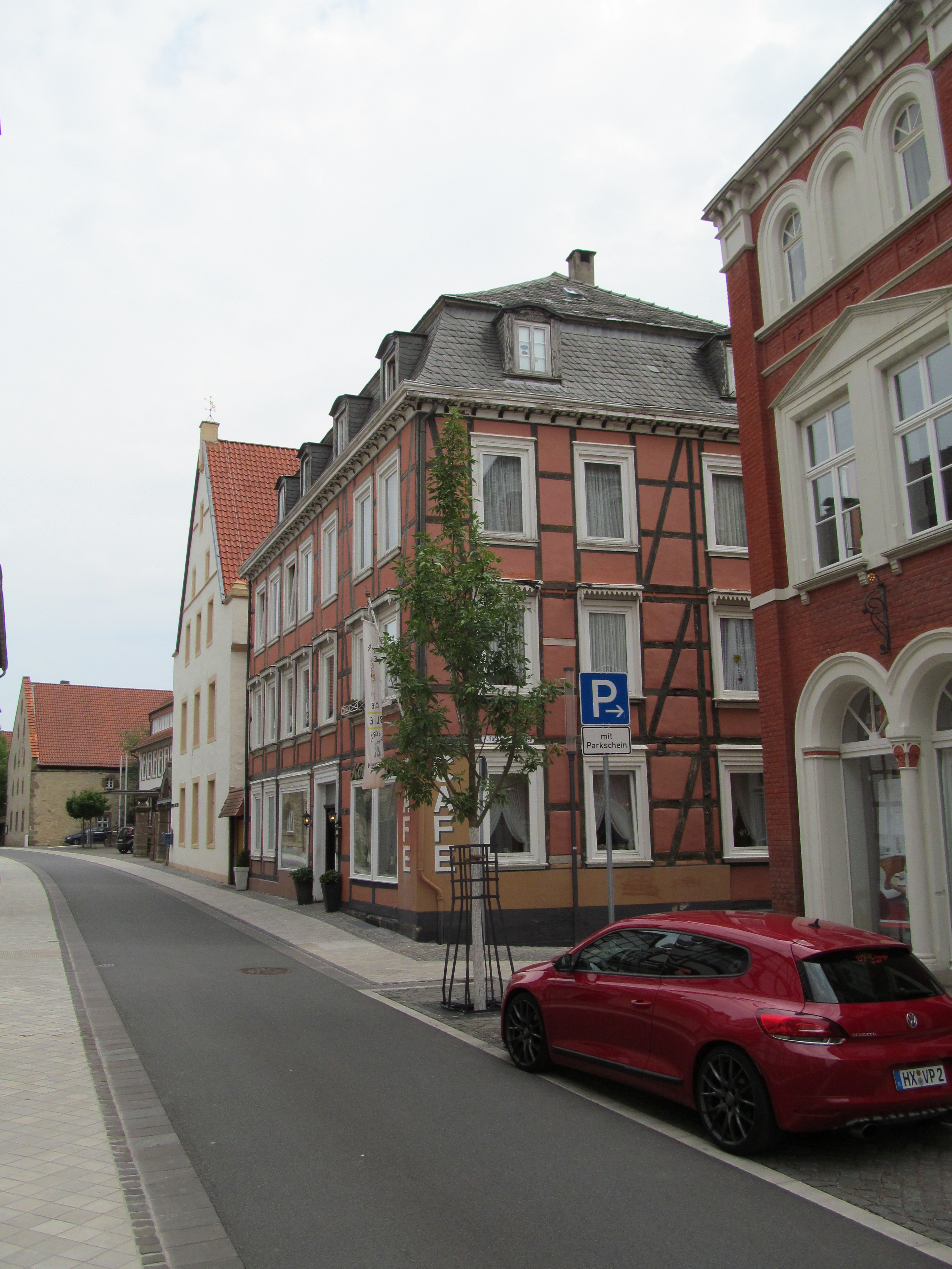 das Haus Sternstraße 37 in Warburg